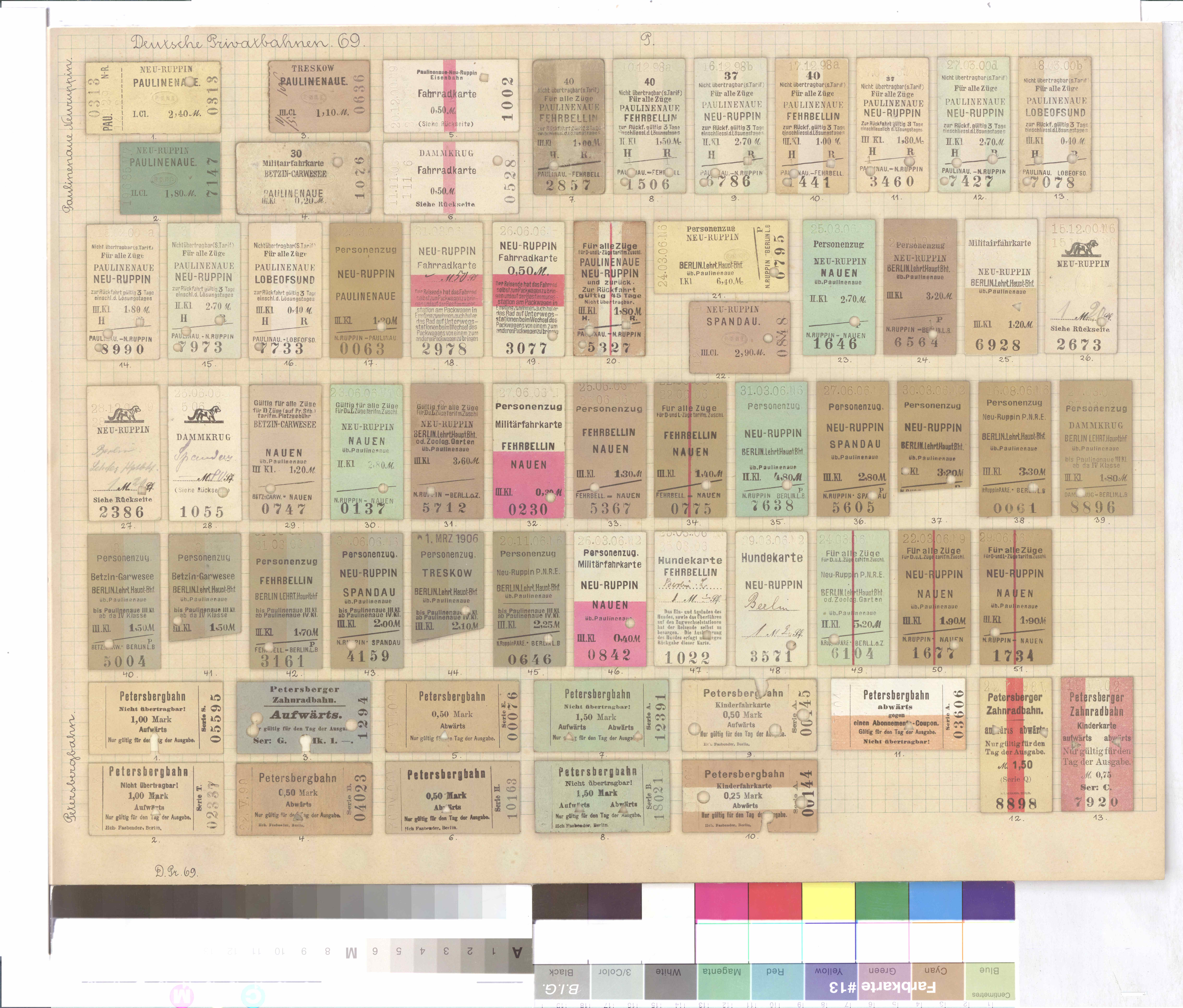 Die Tableaus mit Eisenbahnfahrkarten wurden von dem Sammler und Opernsänger Fritz Hellmuth zwischen dem Ende des 19. Jahrhunderts bis ca. 1925 erstellt. Hierfür sammelte er weltweit auf eigenen Reisen Fahrkarten oder ließ sich diese von den Eisenbahngesellschaften zuschicken. Die Sammlung wurde 1926 vom Berliner Verkehrs- und Baumuseum übernommen und ist heute im Historischen Archiv der Stiftung Deutsches Technikmuseum Berlin zugänglich. Das vorliegende Tableau zeigt 64 Fahrkarten.